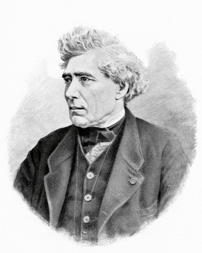 GAVARRET (Jules Louis Dominique), in Corlieu A.: Centenaire de la Faculté de Médecine de Paris (1794-1894), F. Alcan (Paris), 1894.